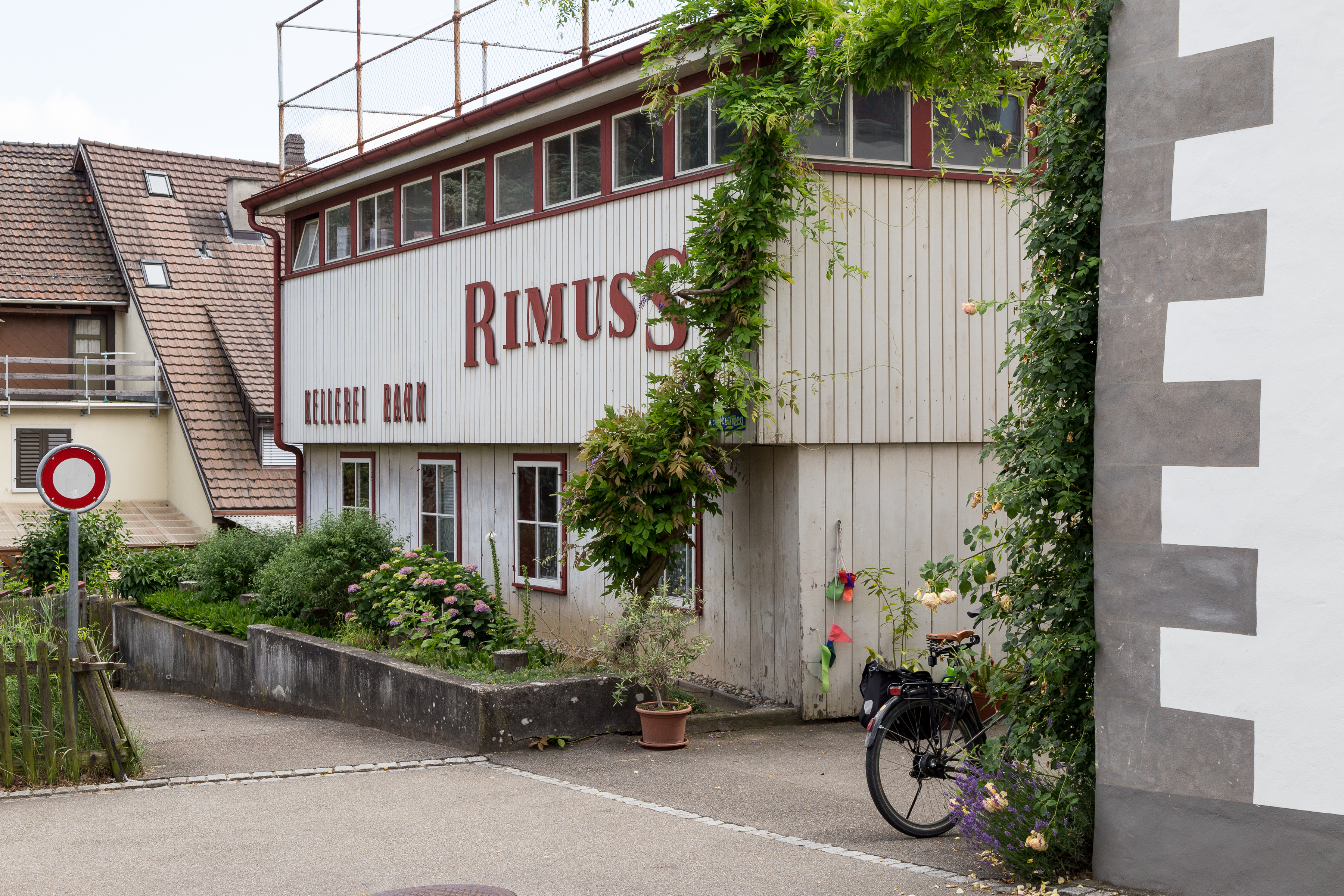 Gebäude der Rimuss Kellerei Rahm im Zentrum von Hallau